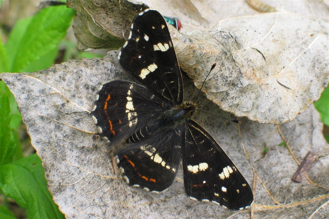 Landkärtchen (Araschnia levana), schwarze Variante